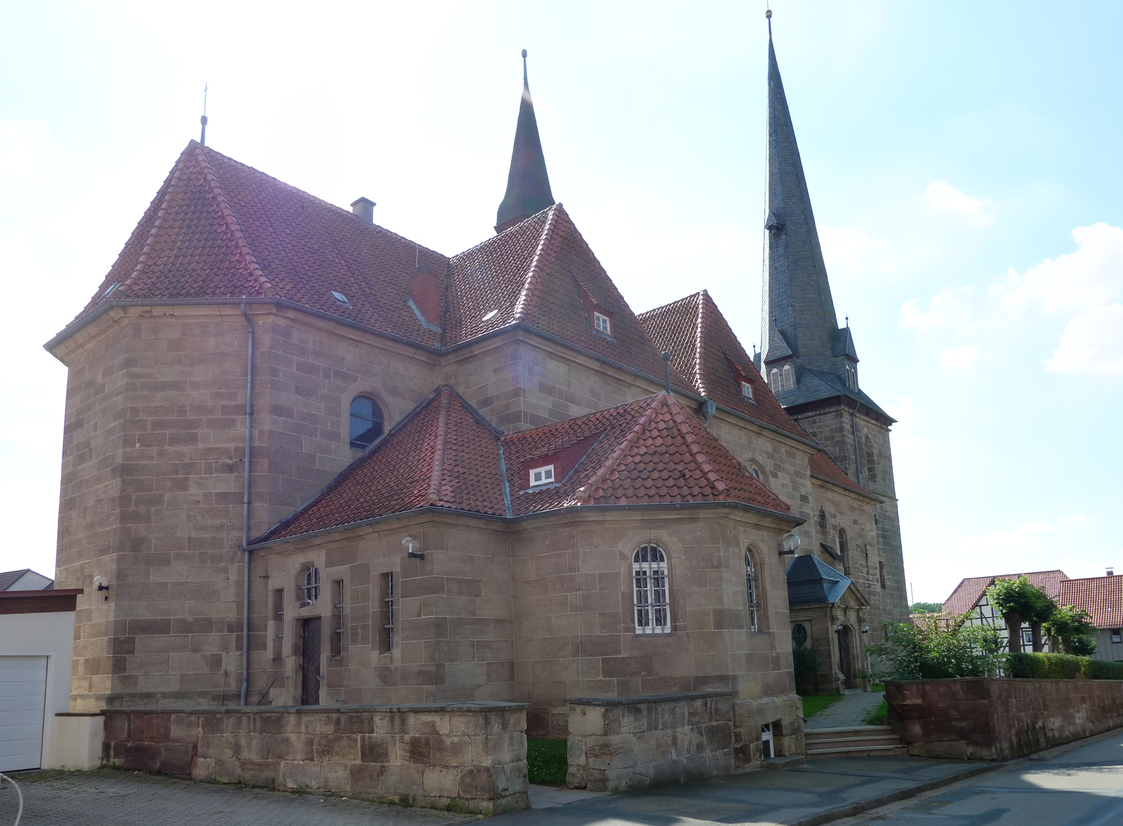 Katholische Pfarrkirche St. Blasius in Obernfeld, Niedersachsen. Westturm (datiert 1448) und Teile des Langhauses spätgotisch, Brand und WIederaufbau 1626/29, Umbauten 1721 und 1750, Osterweiterung 1912/14